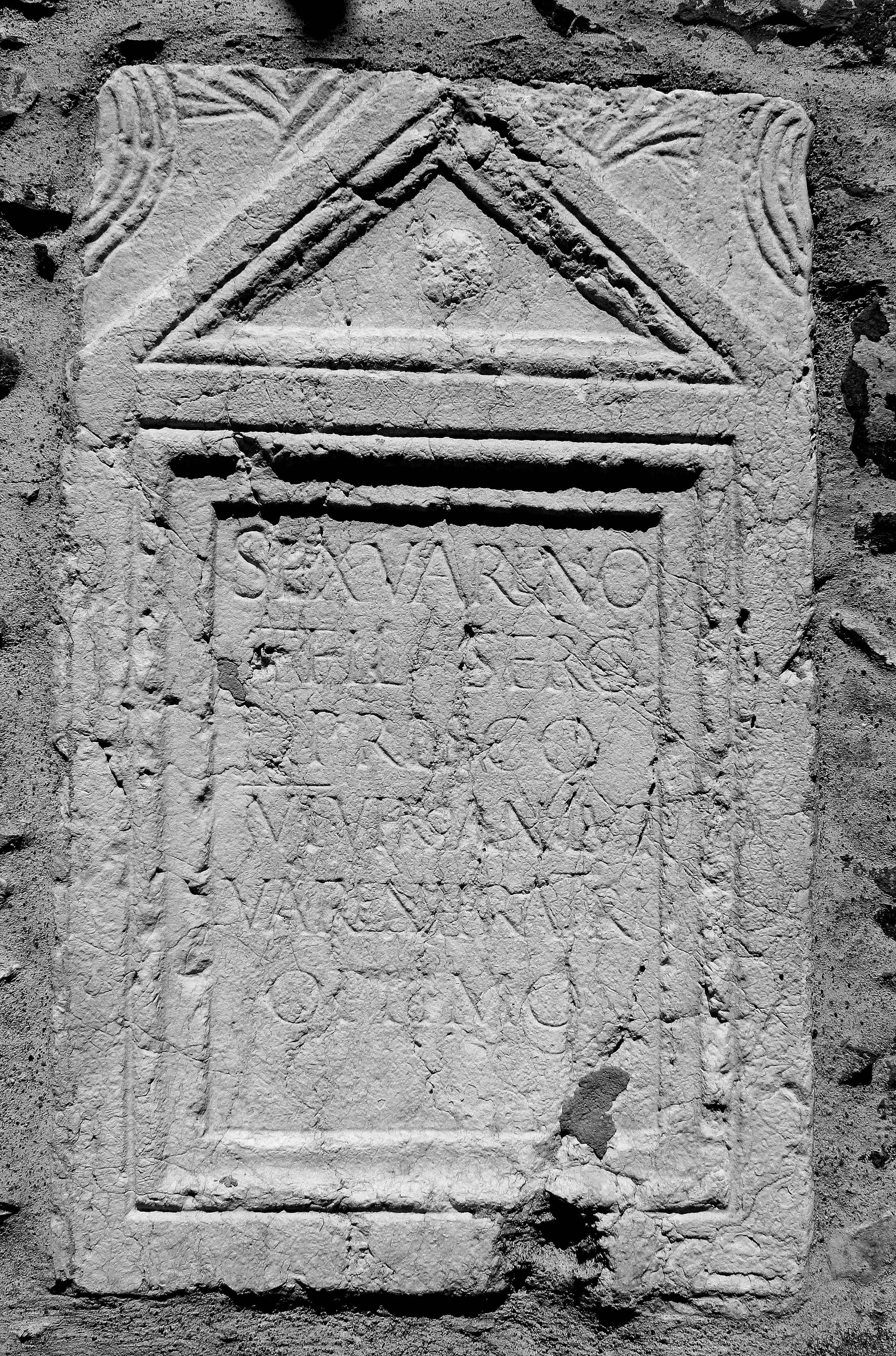 Suisse, canton du Valais, Massongex, Tarnaiae, vicus celtique, gallo-romain : Tarnaiae, anc. nom de Massongex, fut la principale localité du peuple celte des Nantuates, avant l’arrivée des Romains, qui y construisirent notamment des thermes. Des restes d’un pont y furent aussi découverts.